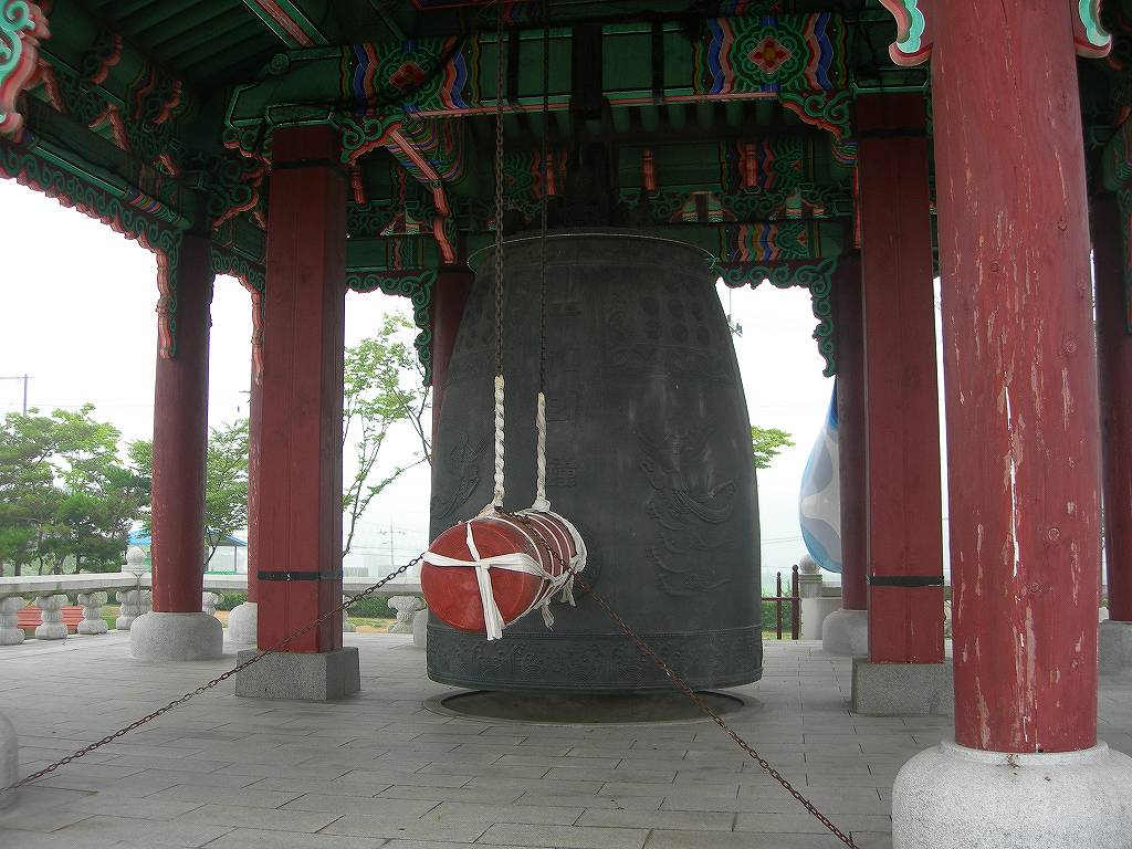 朝鮮戦争時に使われた銃やヘルメットを溶かして作られた鐘